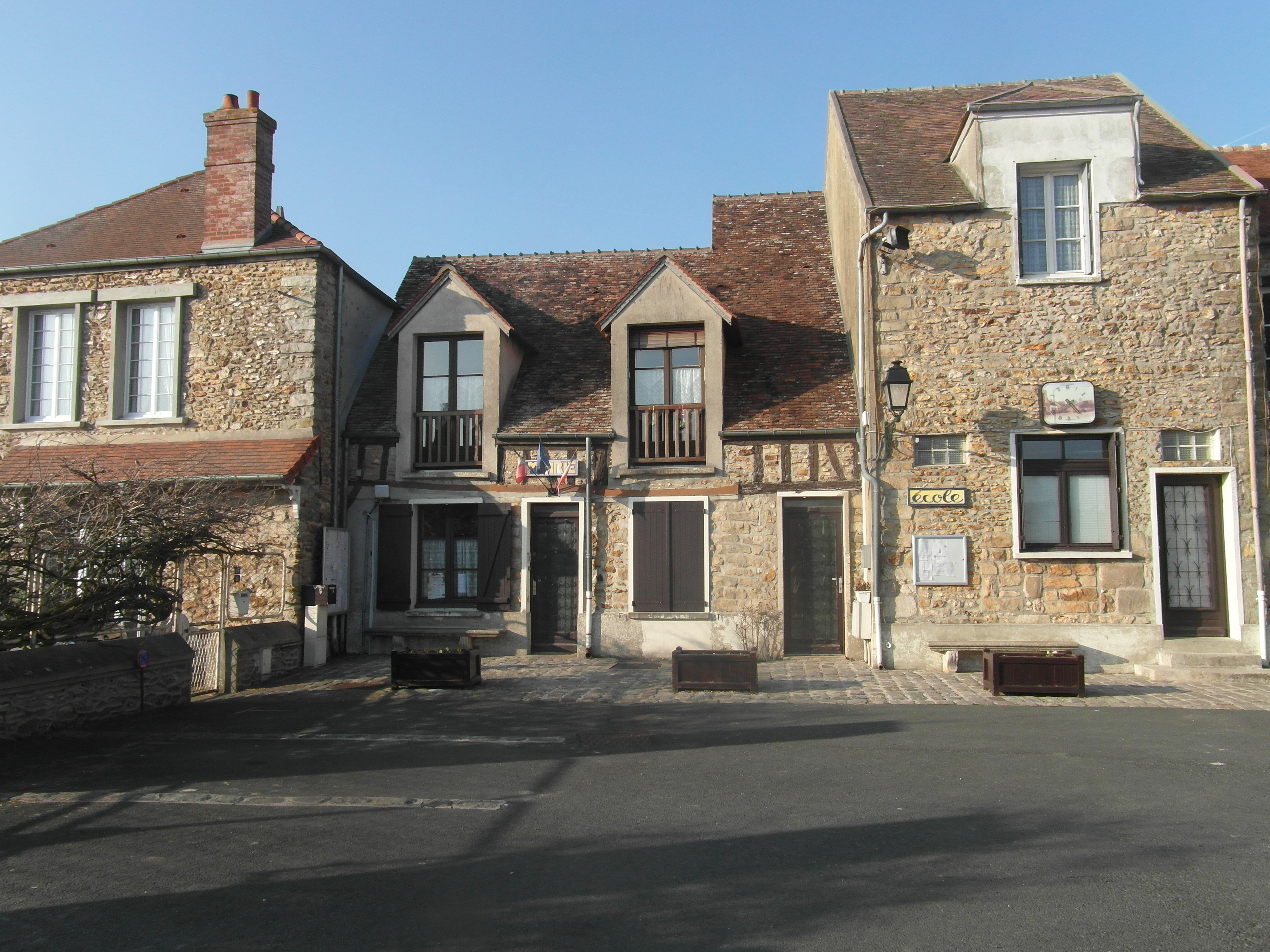 Mairie de Lissy (Seine-et-Marne)